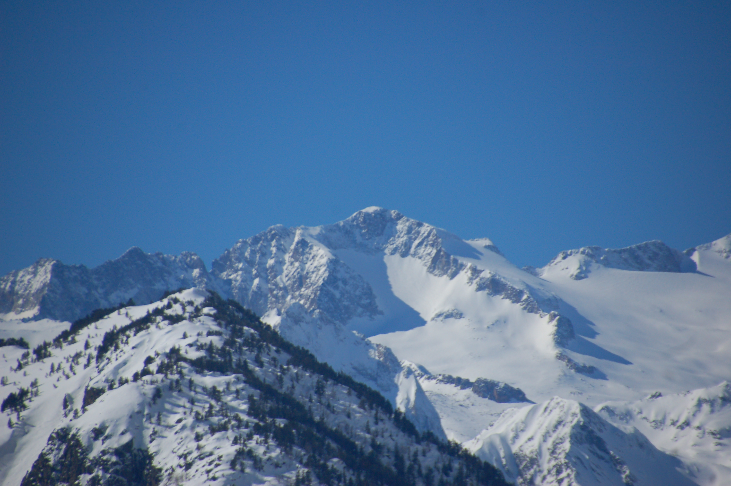 El Pic d´Aneto vist des del Pla de Beret Vall d´´ Aran CODI ES510146 The view of Aneto´s summuit in the Vall d´Aran